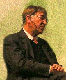 Norbert Gansel (* 1940), deutscher Politiker (SPD), Oberbürgermeister von Kiel (1997-2003)